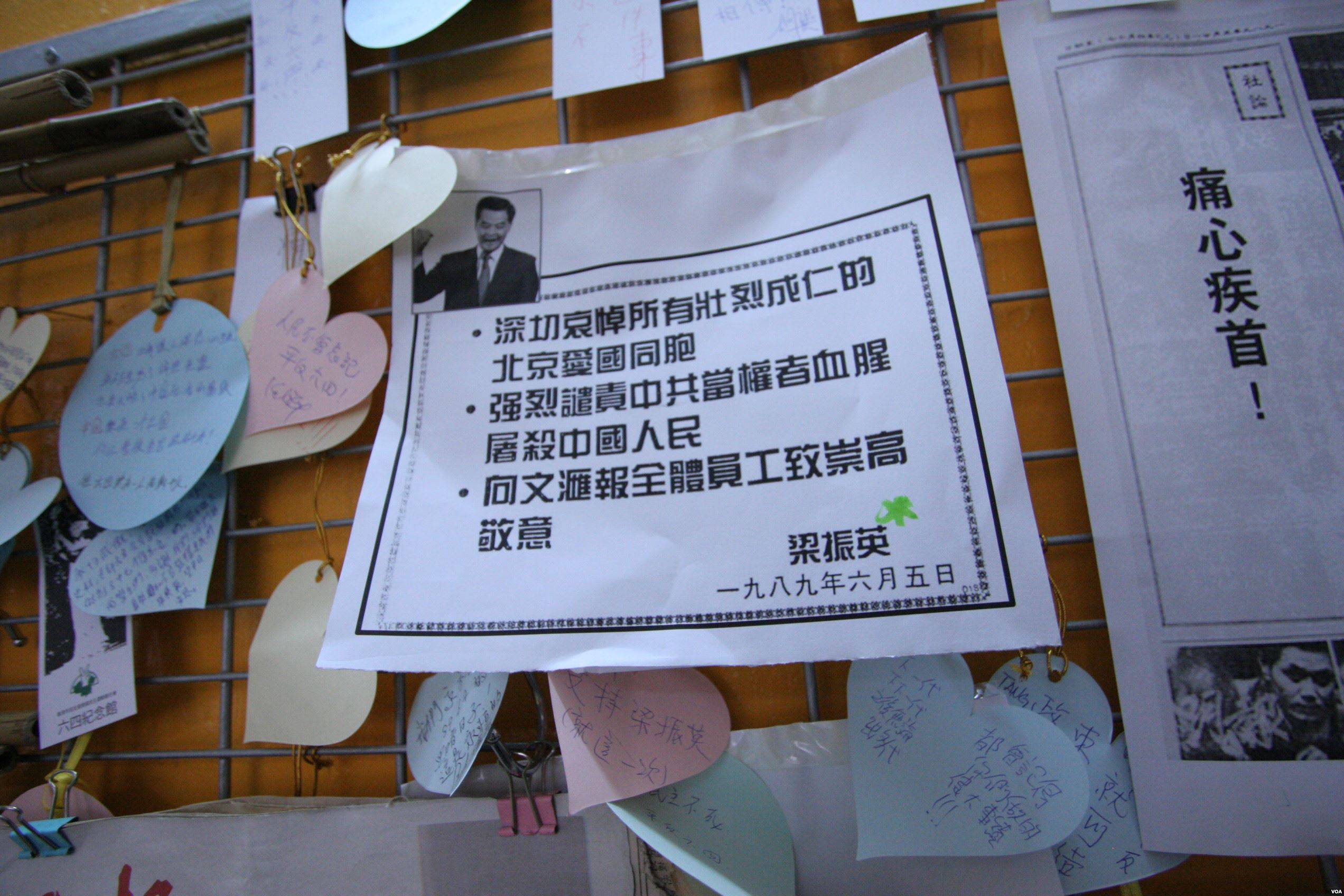 香港六四纪念馆参观纪录